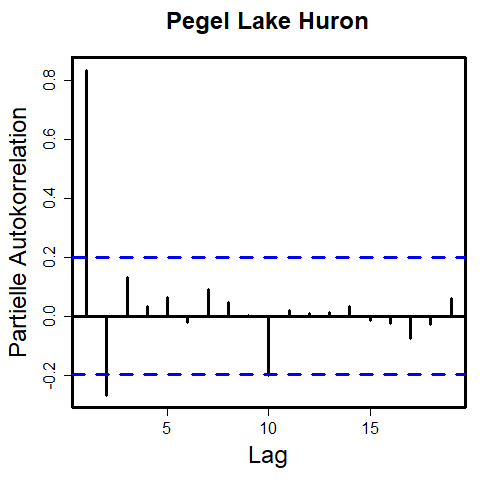 PACF der lakeHuron Zeitreihe R-Quelltext: LakeHuron ... Level of Lake Huron 1875-1972 png(filename = "partielleAutokorrelation.png", width=1600, height=1200) par(bg="lightgrey",lwd=3) pacf(LakeHuron,main="") title(main="Partielle Autokorrelation einer Zeitreihe",cex.main=3) dev.off